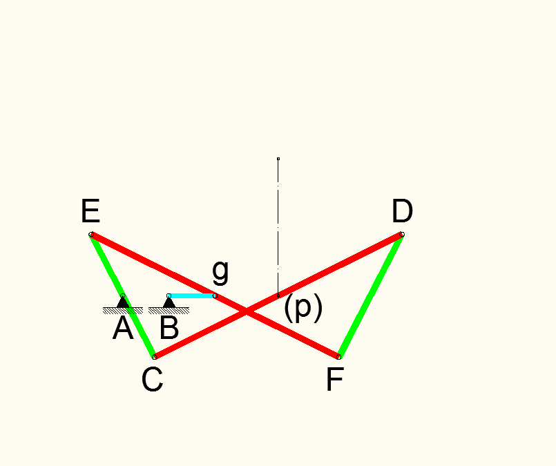 Geometría del Mecanismo de Hart (W) AB = Bg = 2 AC = AE = 3 CD = EF = 12 EC = FD = 6 Cp = pD = 6 Eg = 6